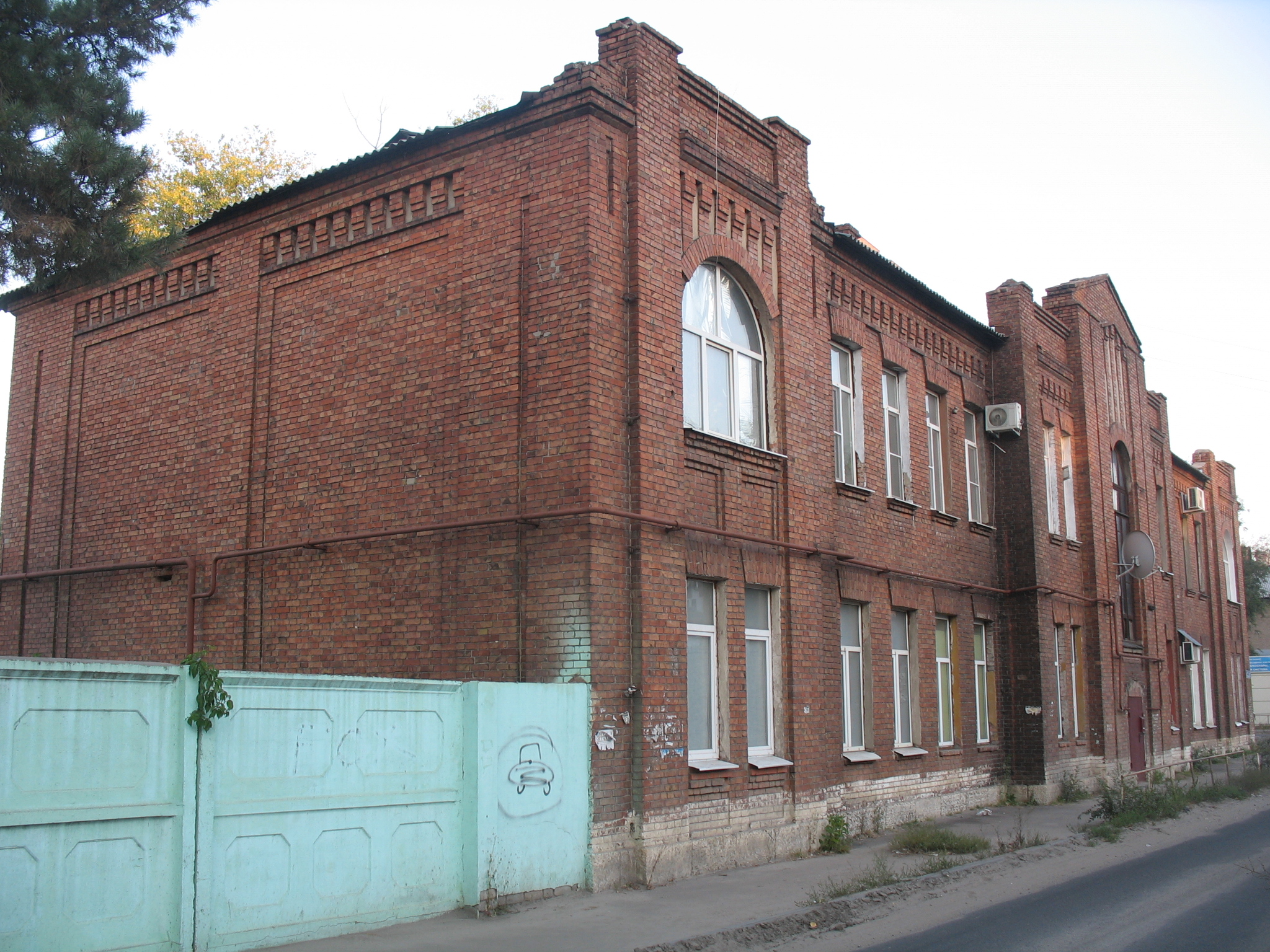 Жилой дом железнодорожников: улица Богдана Хмельницкого, 15, Воронеж, Воронежская область